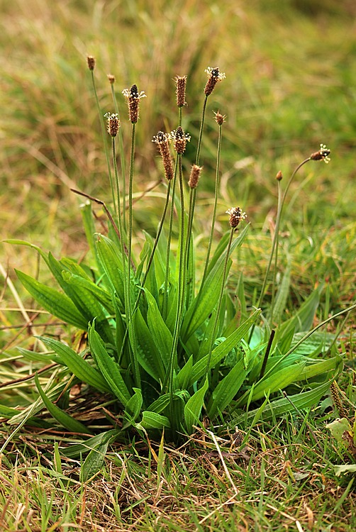 Plantago lanceolata